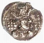 Pièce du règne de Shapur II